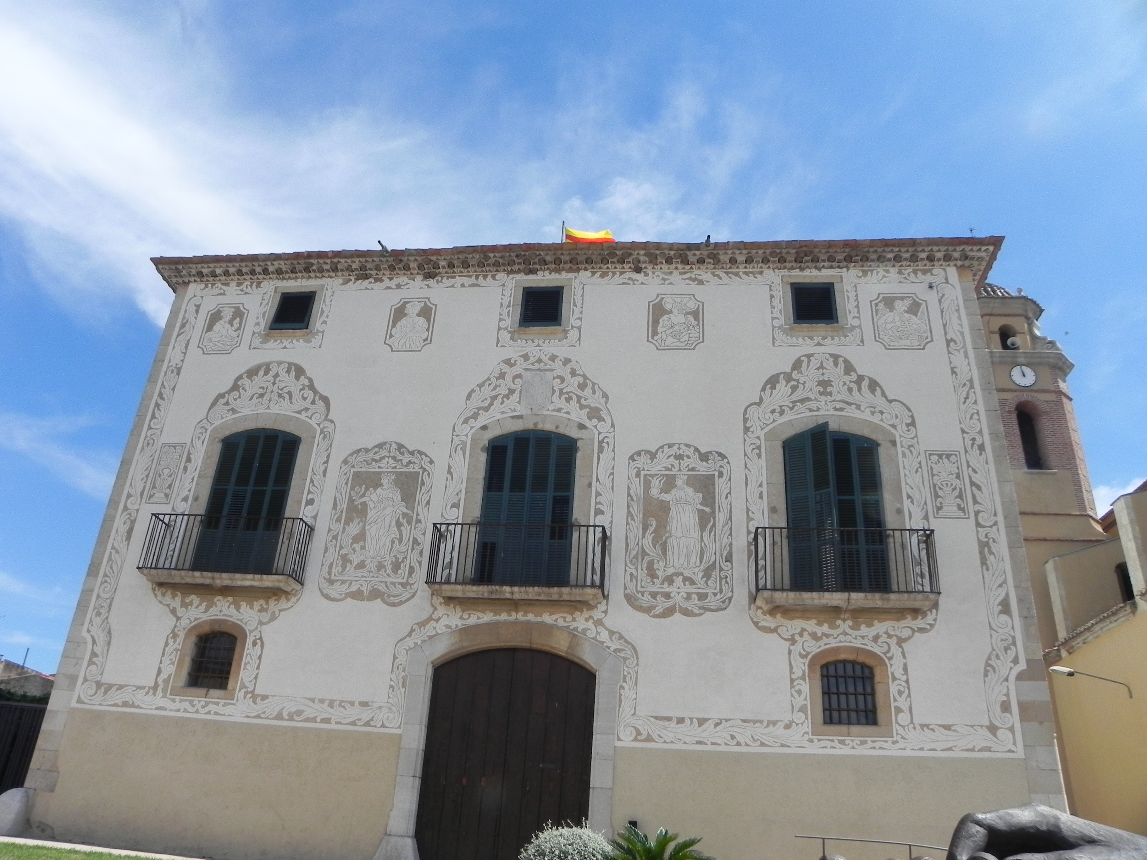 Casal dels Montoliu, dit el Castell del municipi del Morell. Actualment és l'ajuntament d'aquest municipi